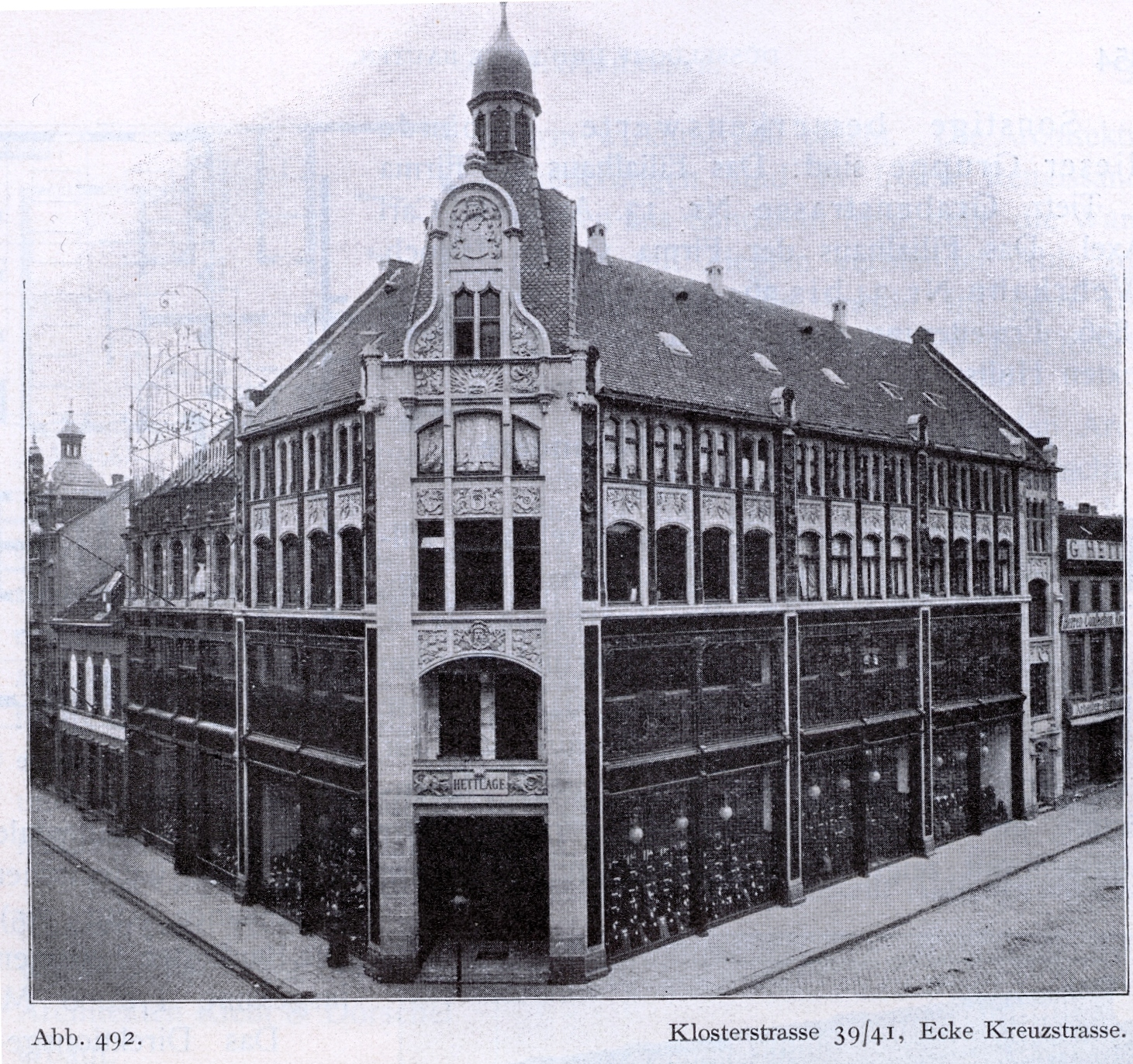 Warenhaus Hettlage an der Klosterstraße 39 – 41, Ecke Kreuzstraße 4 – 6 in Düsseldorf, erbaut vom Architekten Peter Paul Fuchs 1894 für die Firma G. Hettlage, umgebaut 1899 bis 1900 nach Plänen des Architekten Rottlender aus Köln.jpg